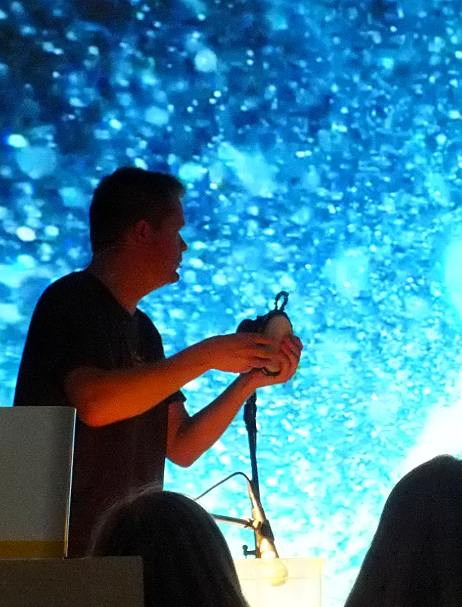 Tom Rudi Torjussen er en norsk perkusjonist. Her fra programmet FLYT som han i 2014 reiste med for Den kulturelle skolesekken (Rikskonsertene)